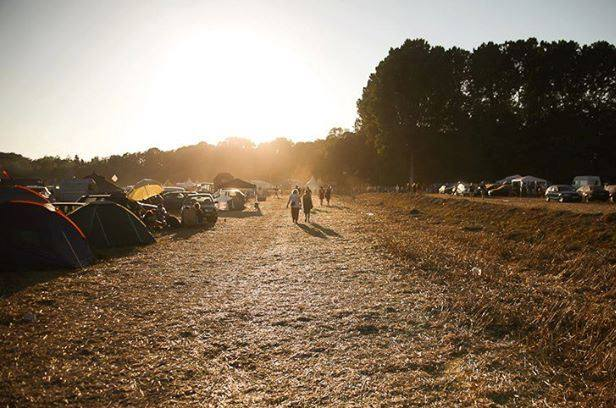 Campingplatz Stemweder Open Air Festival